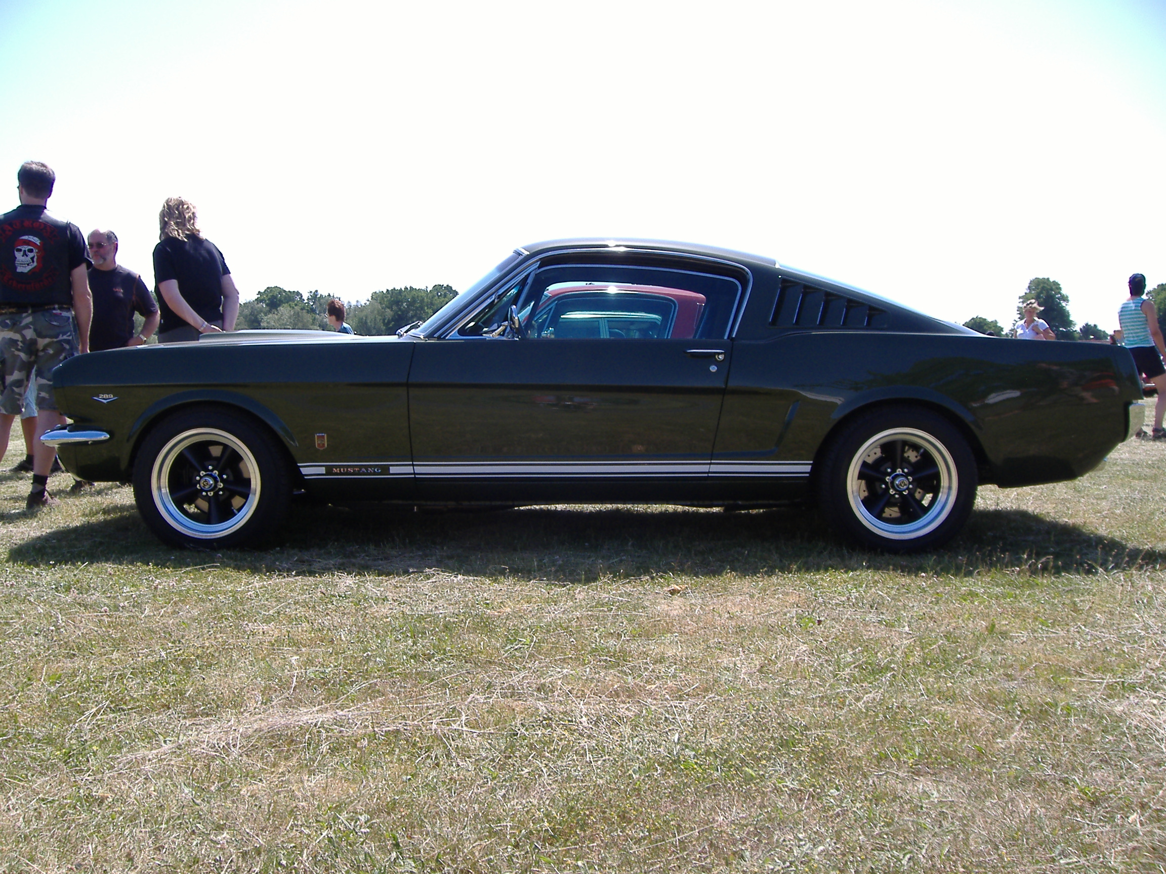 Ford Mustang im "Bullit"-Design